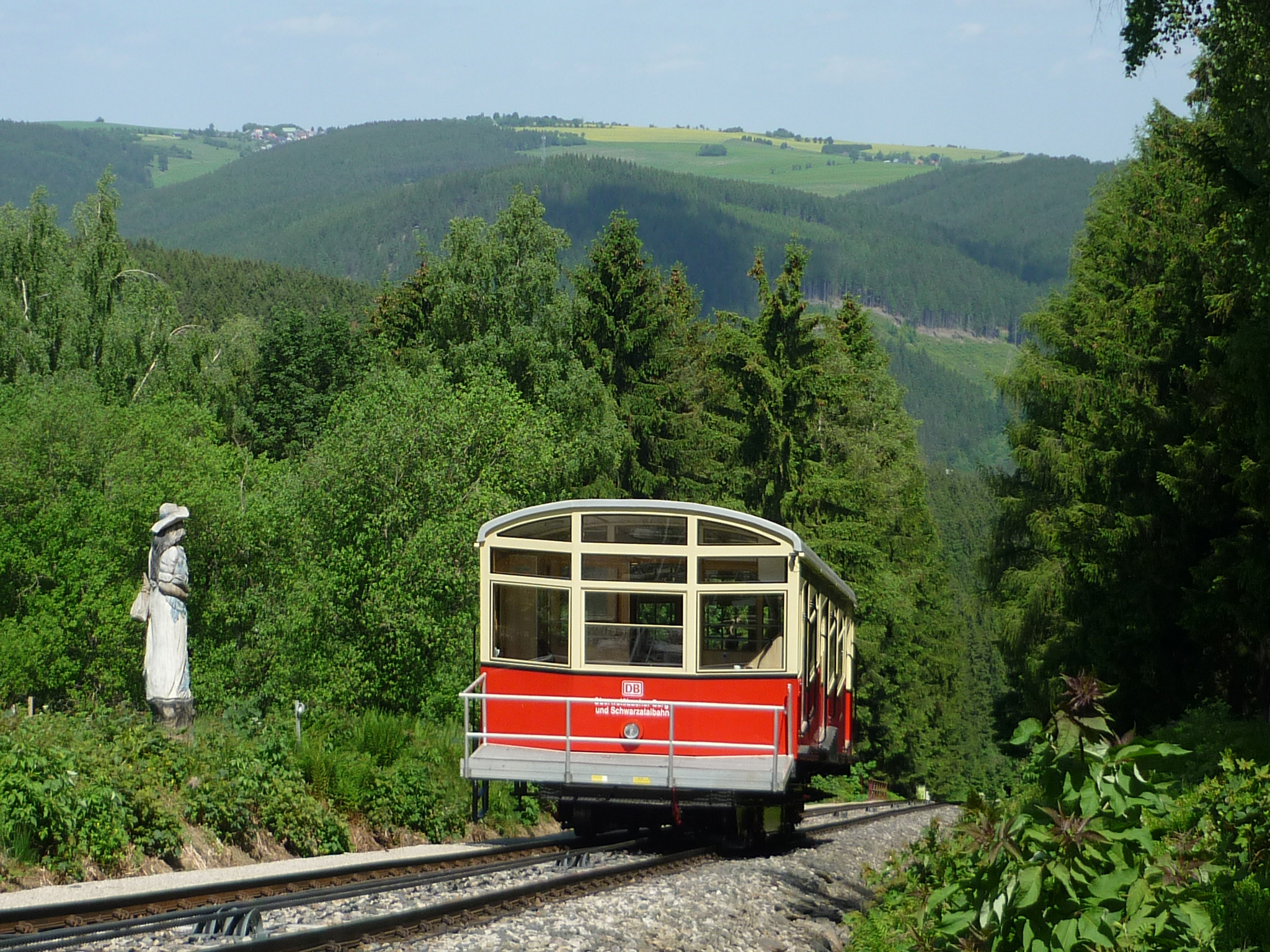 Oberweißbacher Bergbahn, kurz unterhalb der Bergstation Lichtenhain